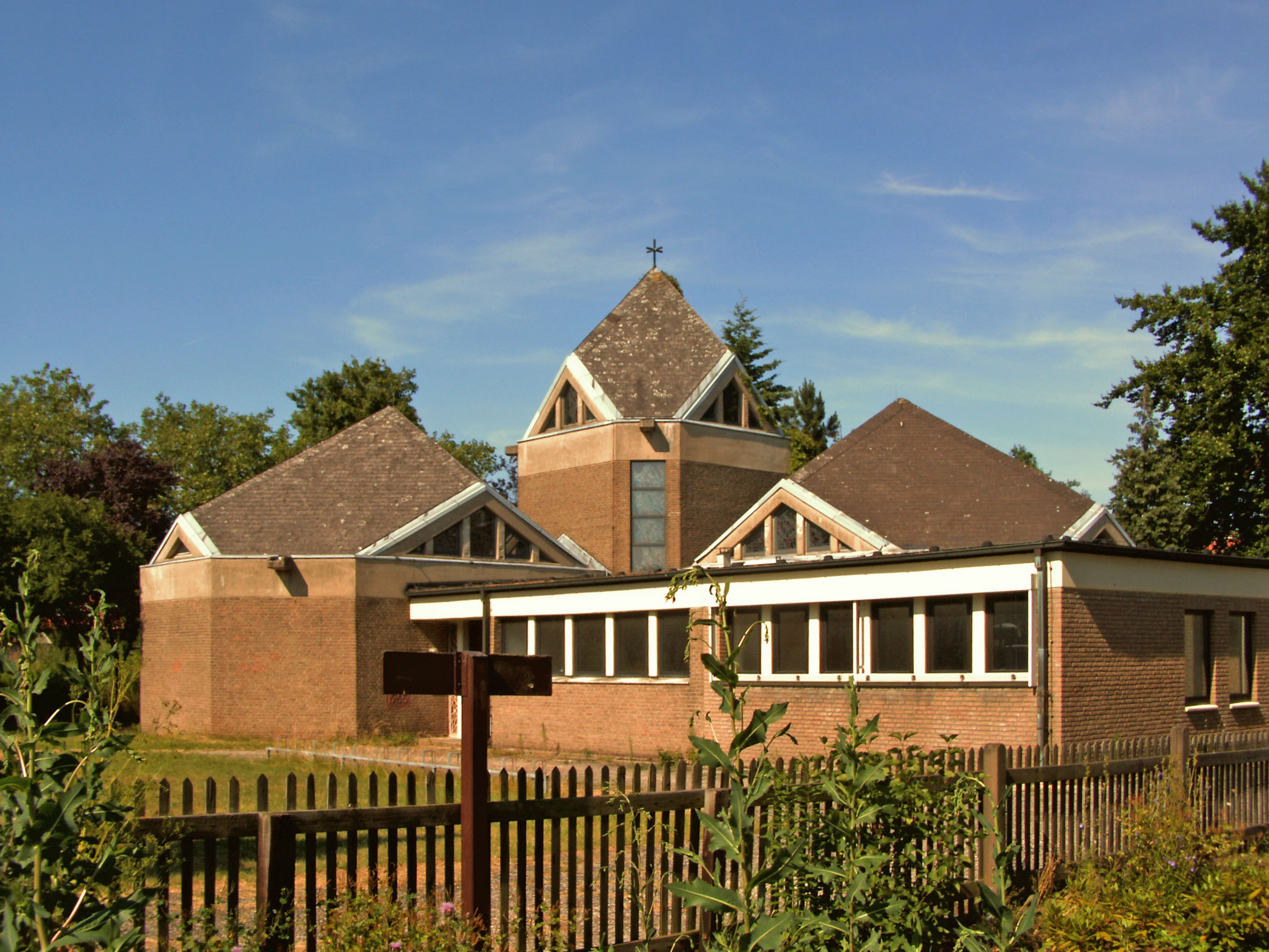 Katholische Klosterkirche des Niels-Stensen-Klosters in Hannover, Stadtteil Buchholz.